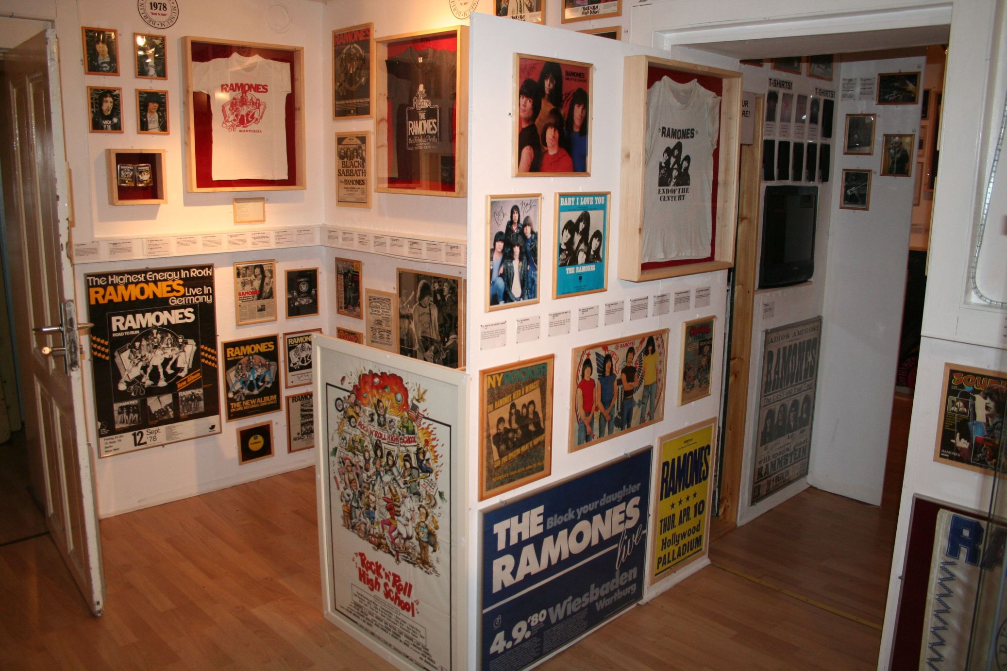 Das Ramones-Museum an seinem ersten Standort in Berlin-Kreuzberg